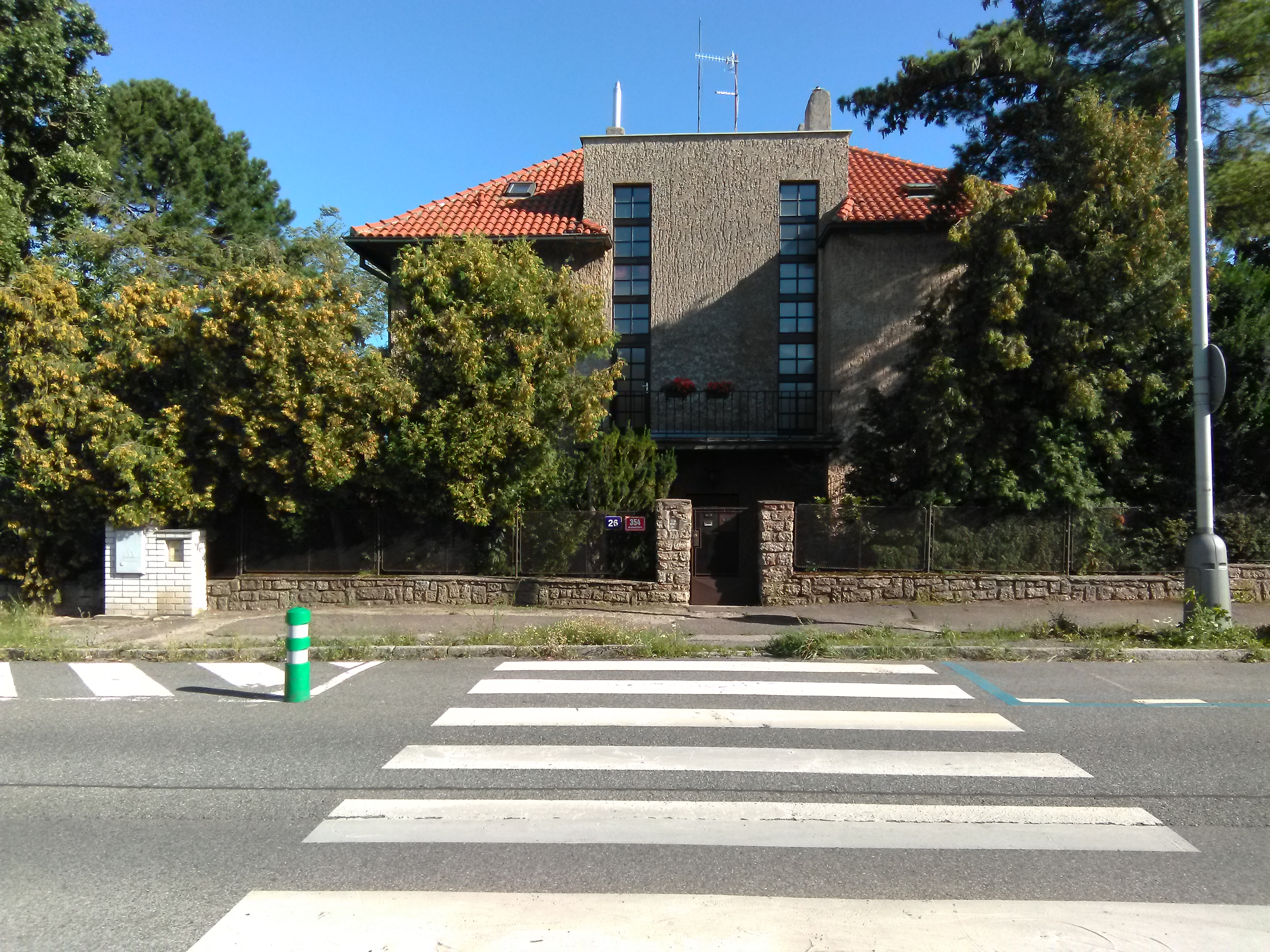 Lumiérů 354/26, Praha 5-Hlubočepy